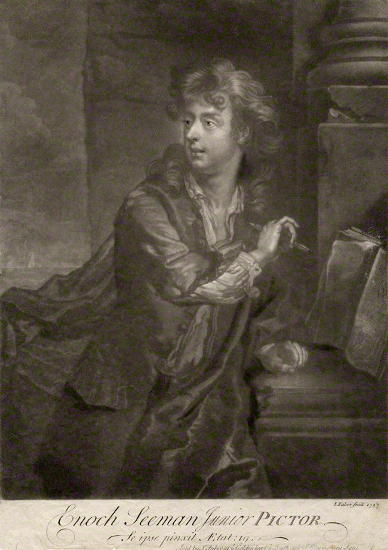 John Faber jun.: Enoch Seeman (nach Enoch Seeman)